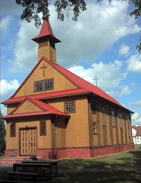 Platerów – drewniany kościół pw. Podwyższenia Krzyża Świętego zbudowany w latach 1934–1935. Kamień węgielny wmurowano 29 kwietnia 1934, natomiast kaplicę poświęcono 10 maja 1935.